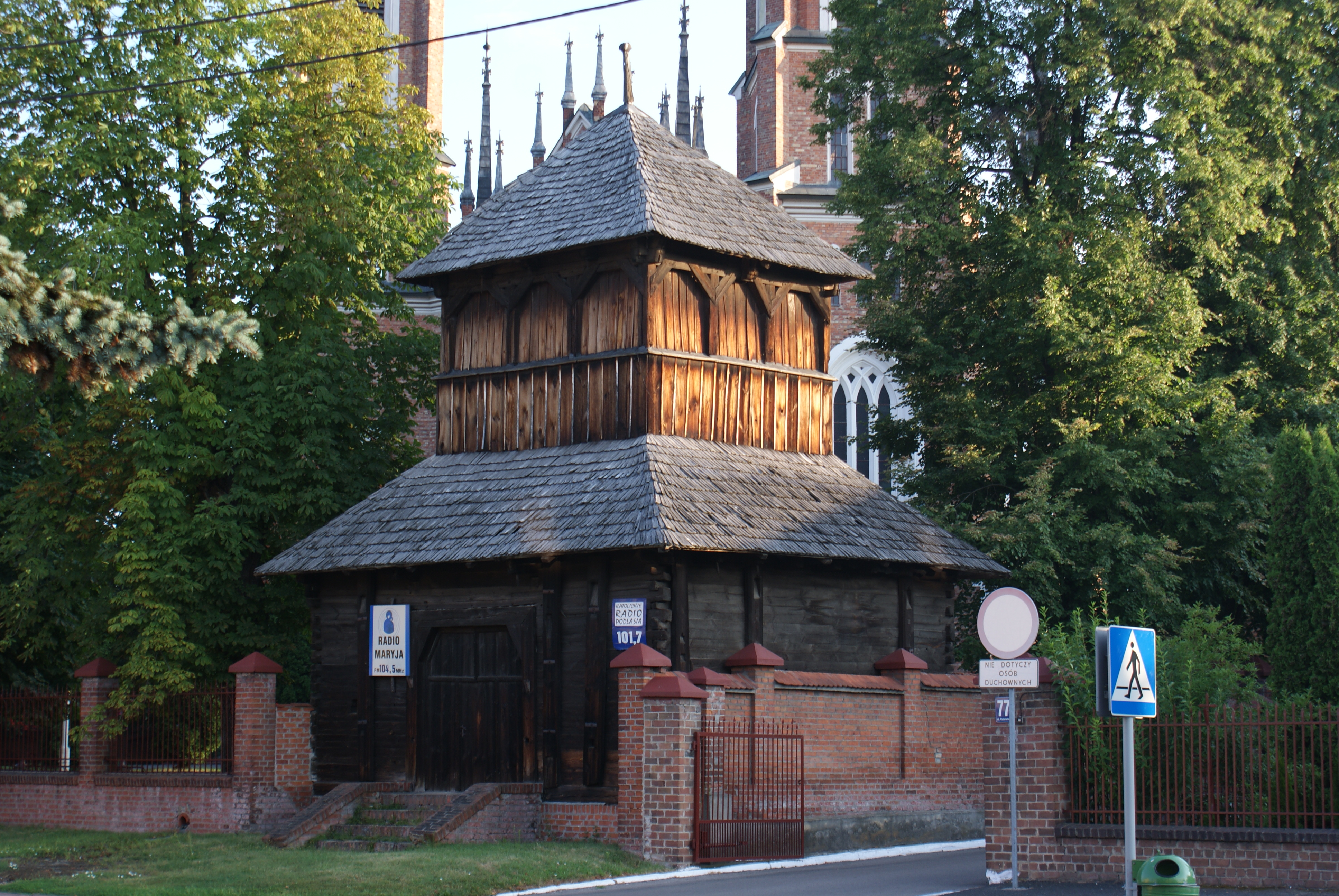 Parczew, dzwonnica, 2 poł. XVIII